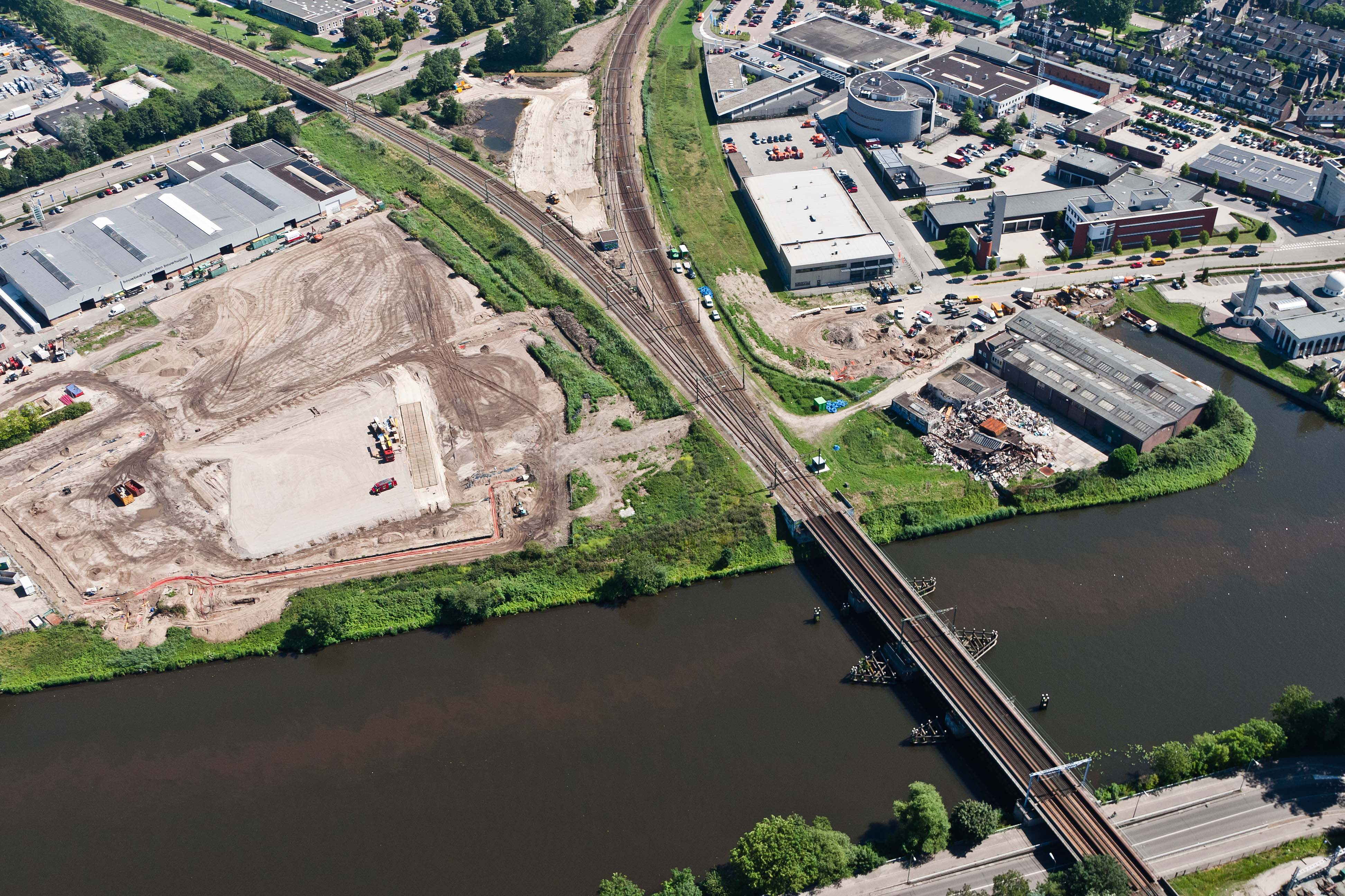 Spoor Den Bosch, ter hoogte van de aansluiting Diezebrug (foto: Rijkswaterstaat)